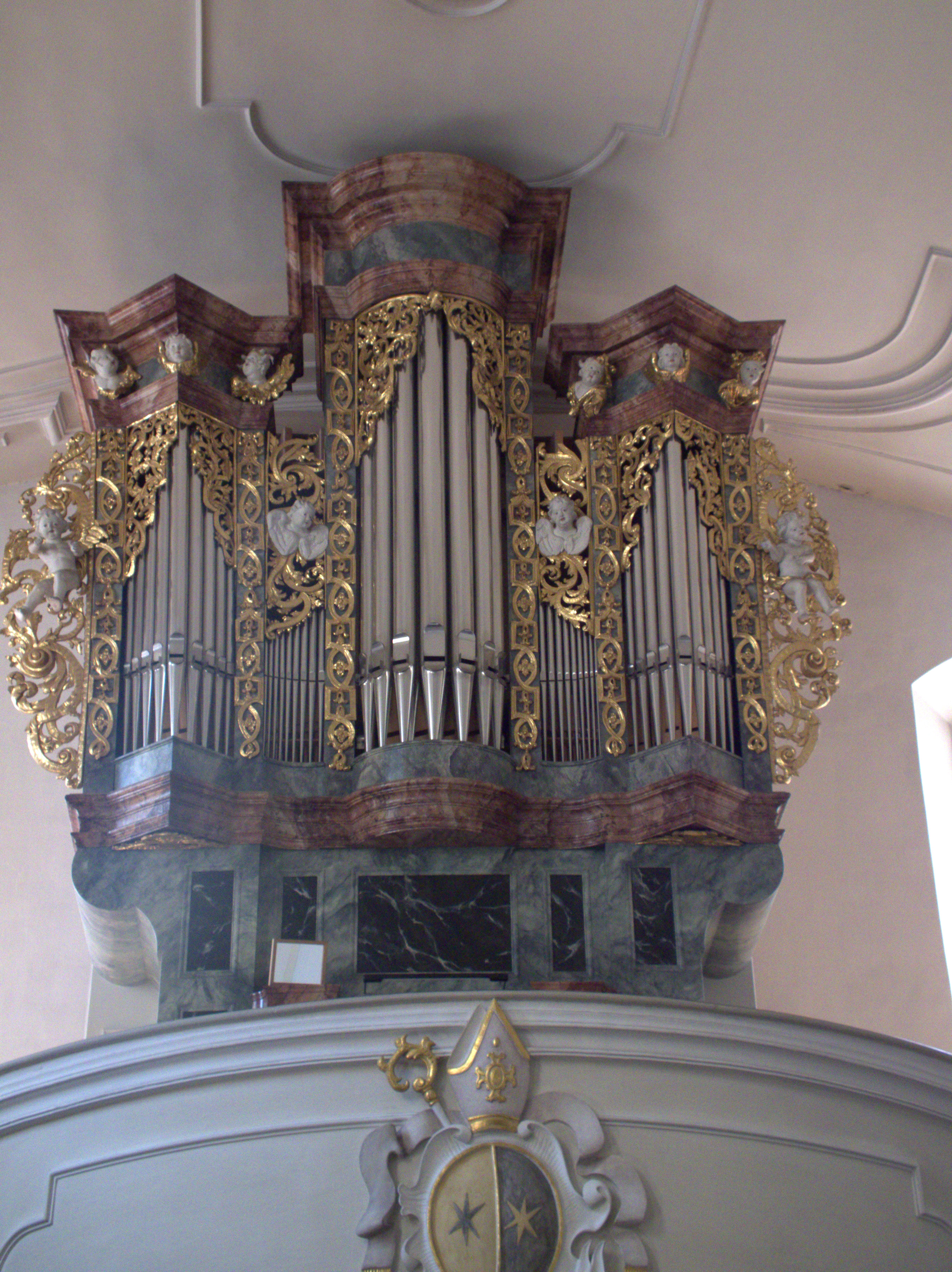 Stiftskirche St Johann in Regensburg am Krauterermarkt 5: Orgel